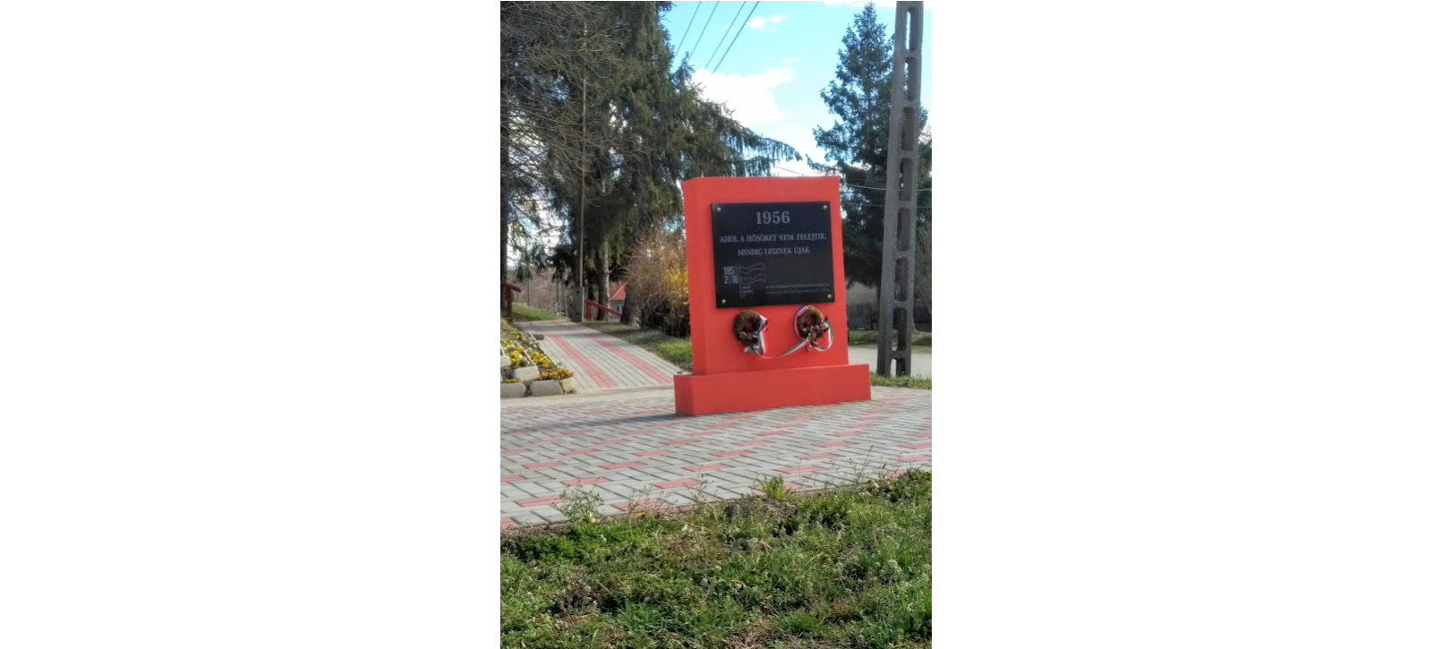 Felsőnyék, 2016-1956 emlékmű